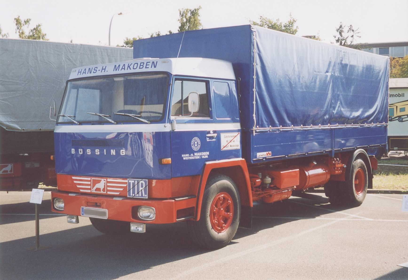 Büssing Lkw Typ BS16 (Löschen) (Aktuell) 11:36, 23. Jan 2006 . . C-C-Baxter . . 1735 x 1192 (140171 Byte) (* Bildbeschreibung: Büssing Lkw Typ BS16 * Quelle: fotografiert in Salzgitter * Fotograf/Zeichner: O. Nordsieck (Einverständnis des Fotografen zur Veröffentlichung unter GNU-Lizenz liegt per E-Mail vor) * Datum: September 2003)